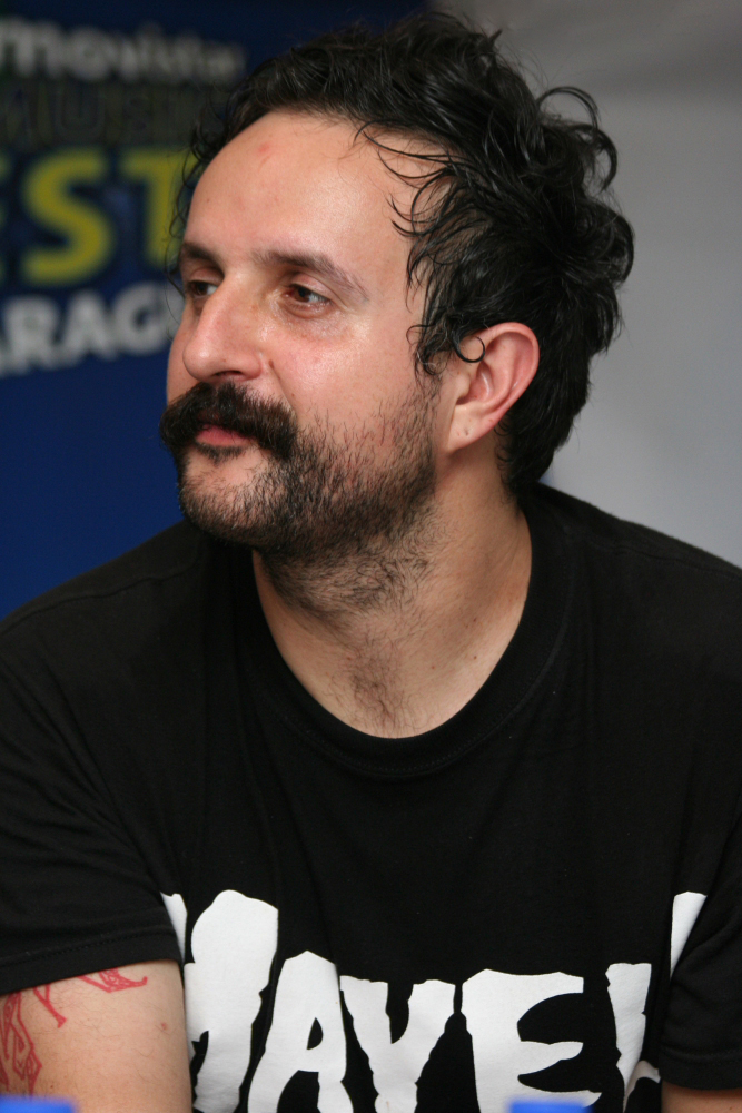 Tito Fuentes